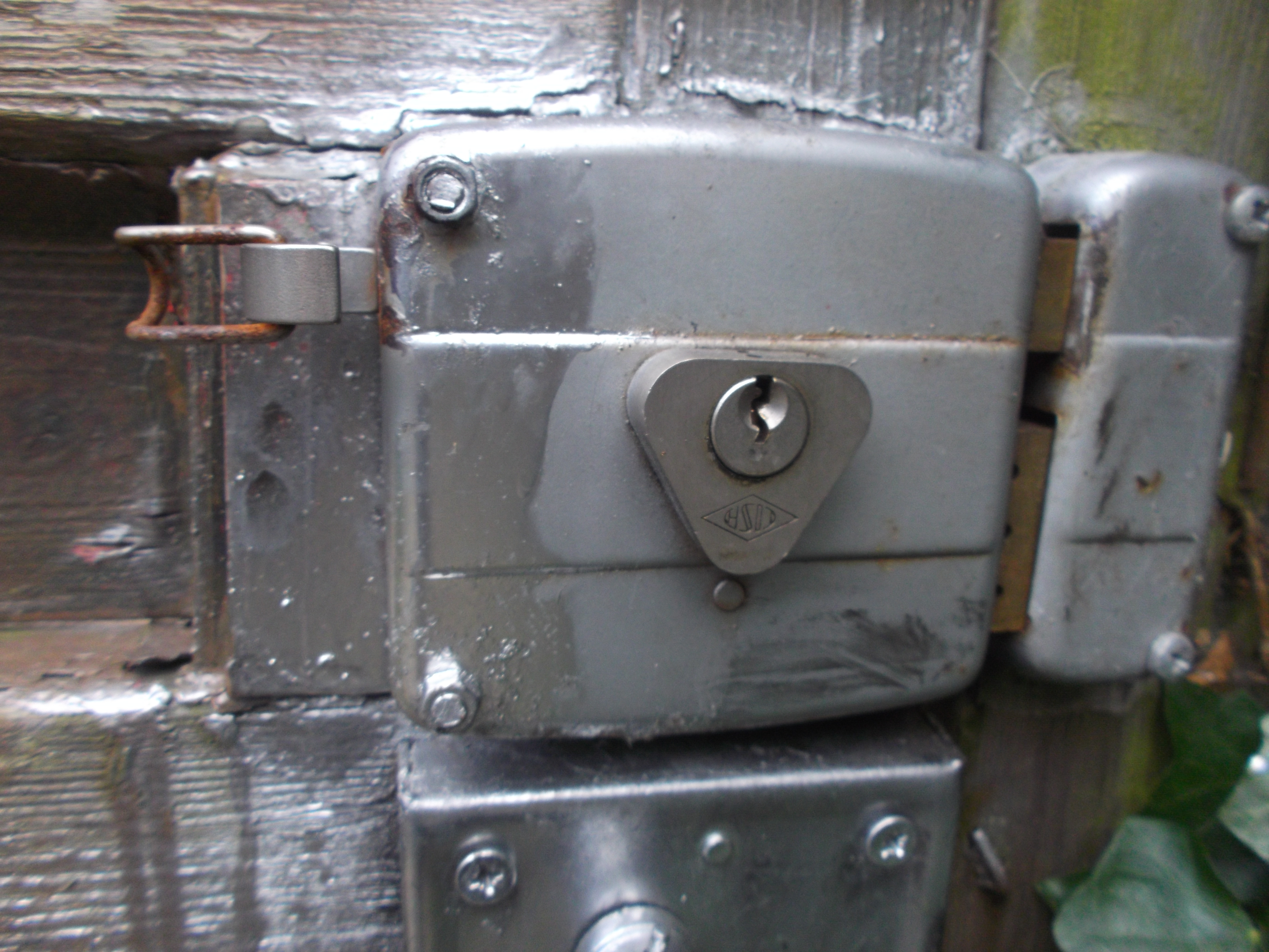 Oude oplegslot (rim-lock) op poort.